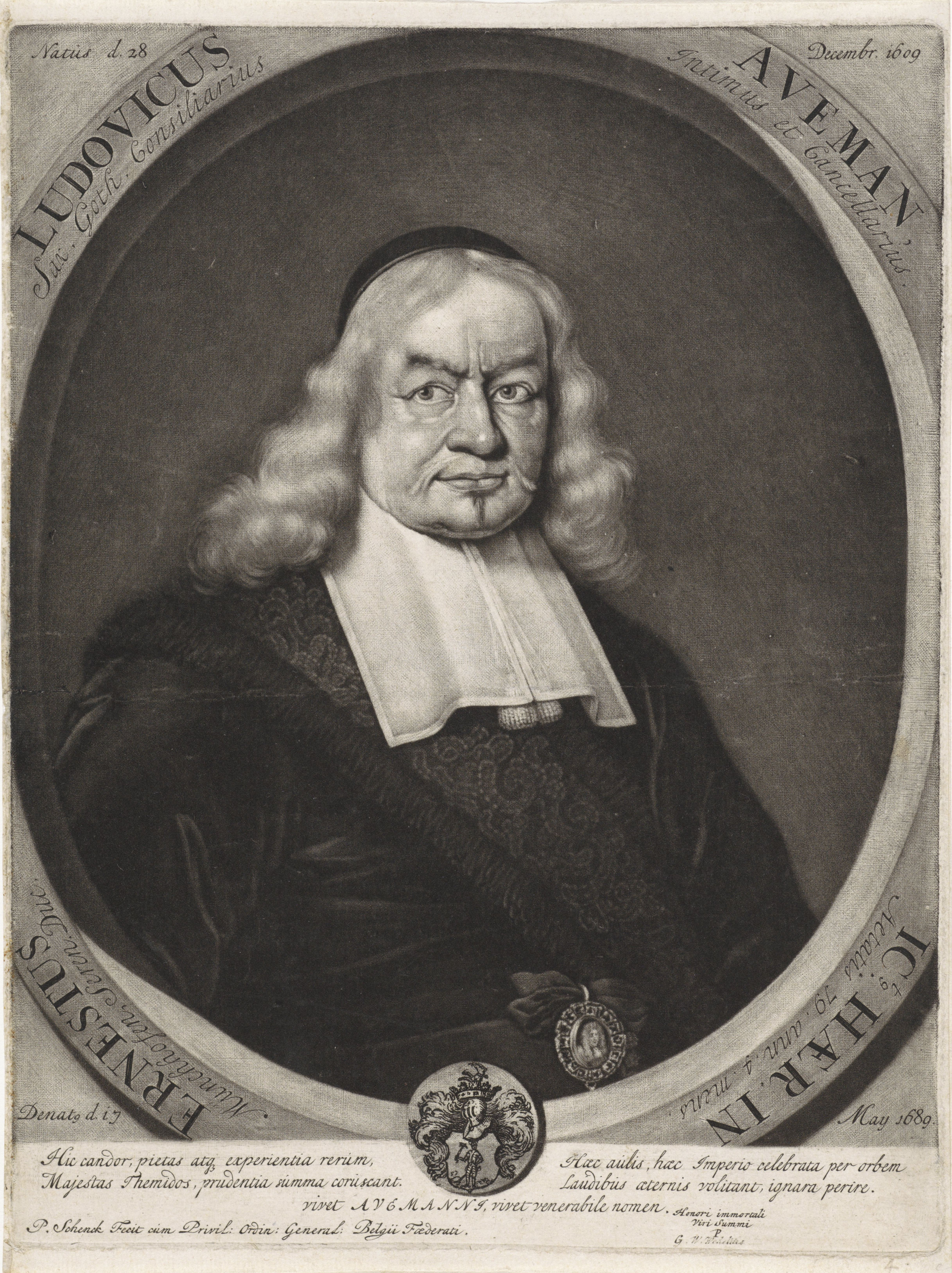 IdentificatieTitel(s): Portret van Ernst Ludwig AvemanObjecttype: prent Objectnummer: RP-P-1910-6932Catalogusreferentie: Hollstein Dutch 499-2(2)Opschriften / Merken: verzamelaarsmerk, verso, gestempeld: Lugt 2228Omschrijving: De kanselier en ambassadeur Ernst Ludwig Aveman met een sjerp. Aan zijn centuur een medaillon met een portret van een man. In de marge zijn familiewapen.VervaardigingVervaardiger: prentmaker: Pieter Schenk (I) (vermeld op object)uitgever: Pieter Schenk (I) (vermeld op object)verlener van privilege: Staten van Holland (vermeld op object)Plaats vervaardiging: AmsterdamDatering: 1689 - 1713Fysieke kenmerken: mezzotint en gravureMateriaal: papier Techniek: mezzotint / graveren (drukprocedé)Afmetingen: plaatrand: h 243 mm × b 185 mmOnderwerpWat: armorial bearing, heraldrypendant, trinket, 'breloque'Wie: Ernst Ludwig AvemannVerwerving en rechtenVerwerving: aankoop 1910Copyright: Publiek domein